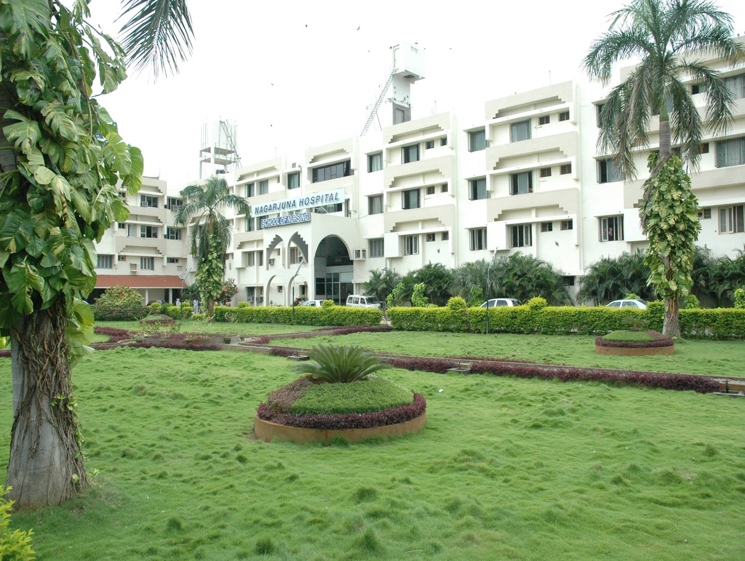 Nagarjuna Hospital